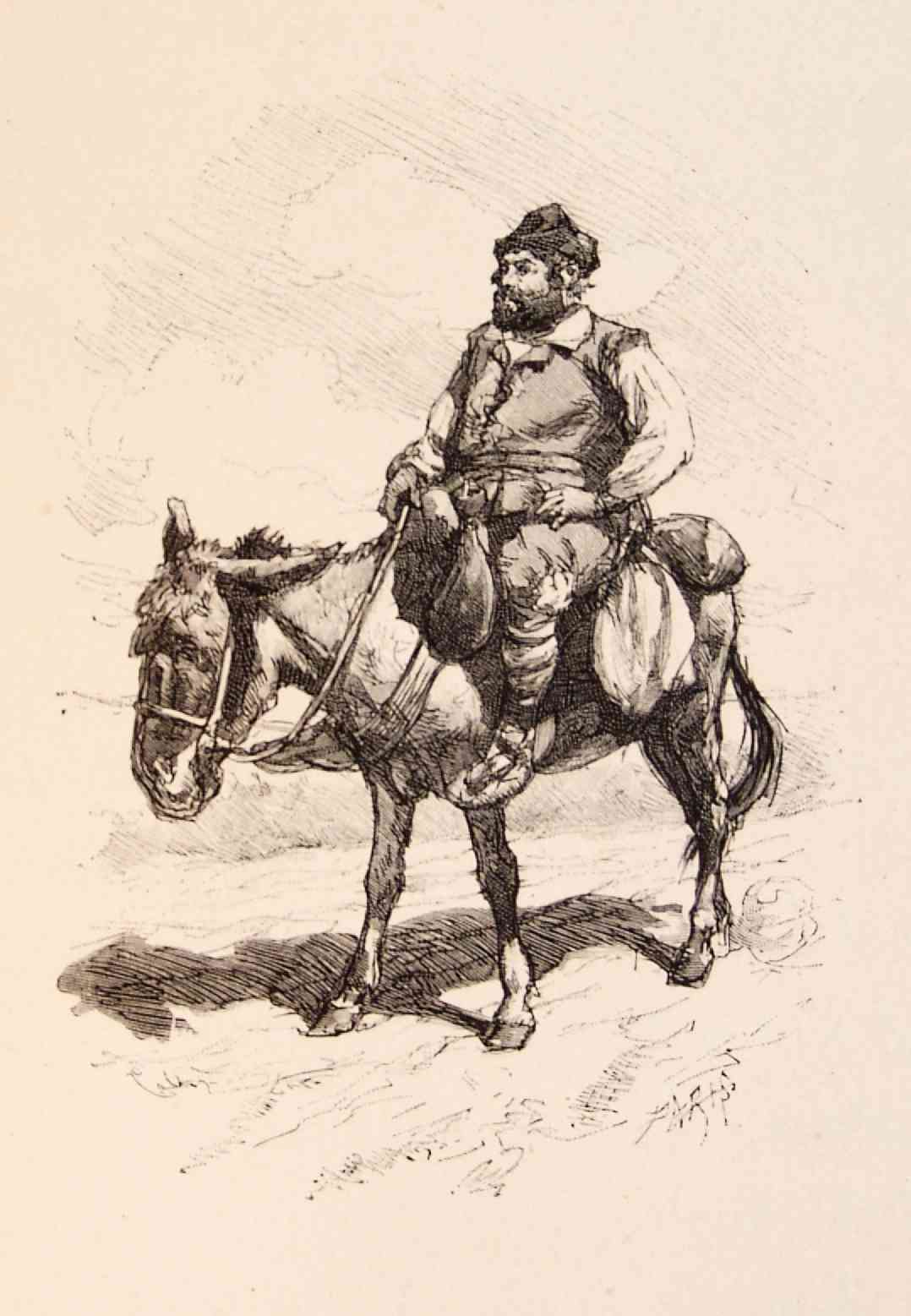 "Don Quixote" — Edición anotada por Nicolás Díaz de Benjumea e ilustrada por Ricardo Balaca (1880-1883). 202_252_quijote_cap53